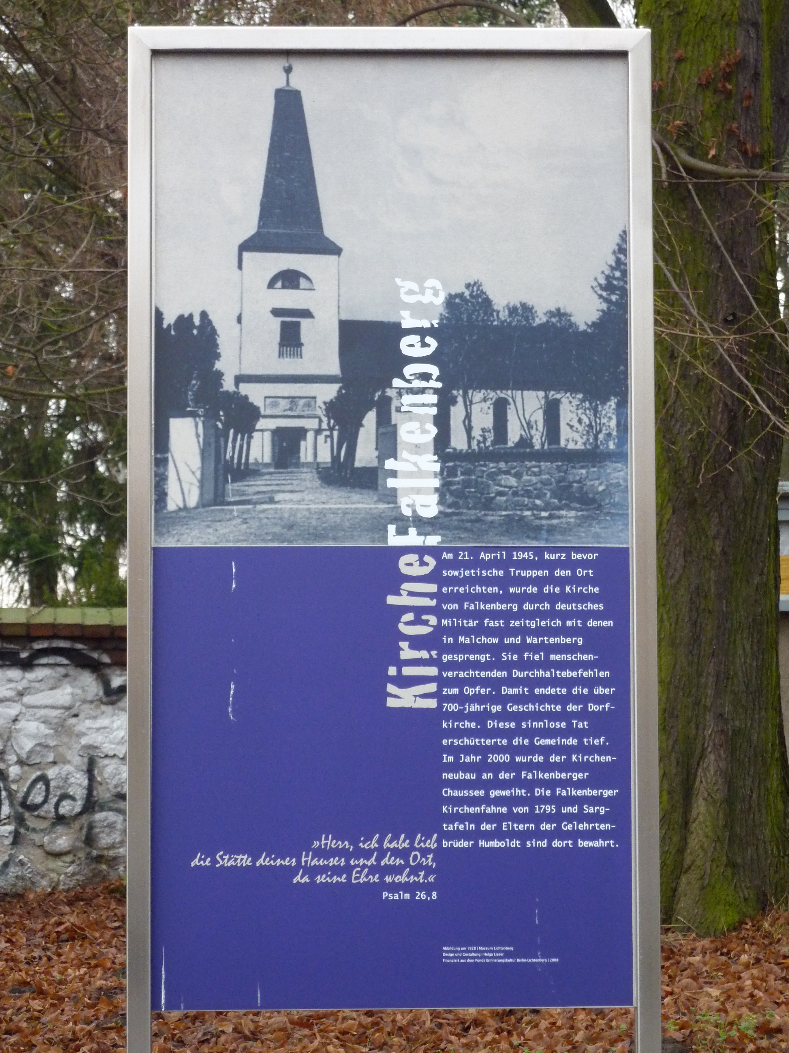 Gedenktafel für die zerstörte Dorfkirche von Falkenberg, vor dem evangelischen Friedhof, Dorfstraße 39 A, 13057 Berlin